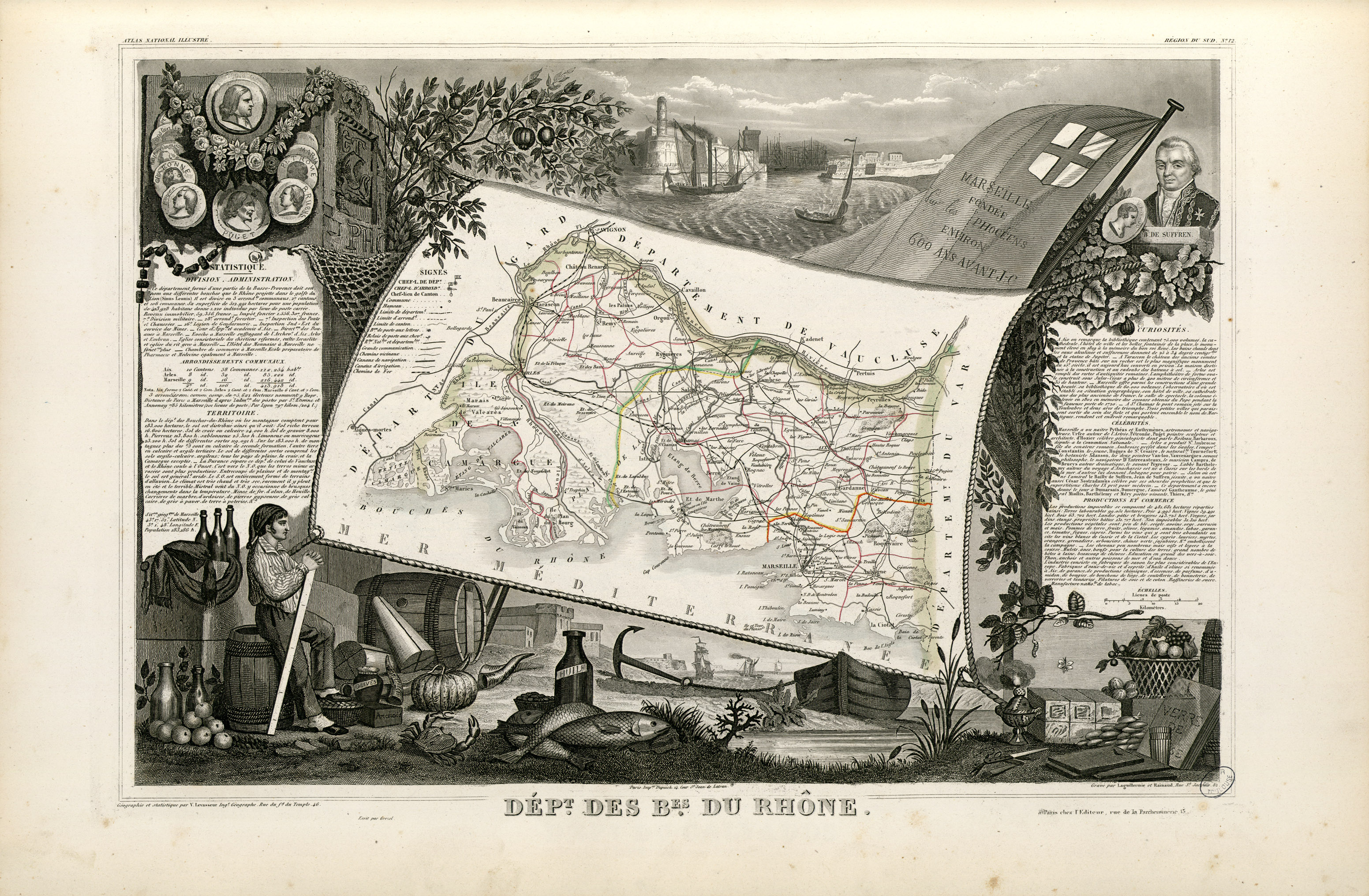 Titre complet du recueil : Atlas national illustré des 86 Départements et des Possessions de la France divisé par Arrondissements, Cantons et Communes avec le tracé de toutes les routes, chemins de fer et canaux. Dressé d'après les Travaux du Cadastre du Dépôt de la Guerre et des Ponts et Chaussées par V. Levasseur, Ingénieur Géographe attaché au Génie du Cadastre et de la Ville de Paris. Gravé sur acier par les meilleurs artistes. Imprimerie de Lemercier à Paris ou imprimerie Dupuich à Paris. Page de titre et 100 pl. en n. et b. et en coul. dont un tableau statistique et 2 cartes dépliantes. Ancely, René (1876 - 1966). Possesseur